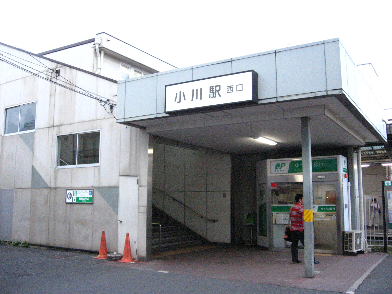 Seibu Haijima line Ogawa station West gate. Kodaira, Tokyo.